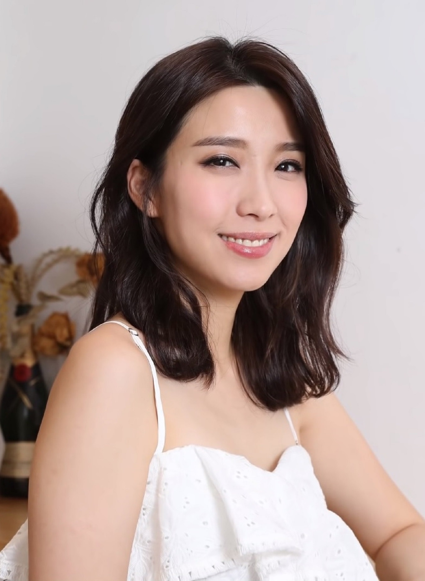 中文（香港）: 2015年萬千星輝頒獎典禮「最佳女配角」及2015、2017年TVB 馬來西亞星光薈萃頒獎典禮「最喜愛TVB女配角」